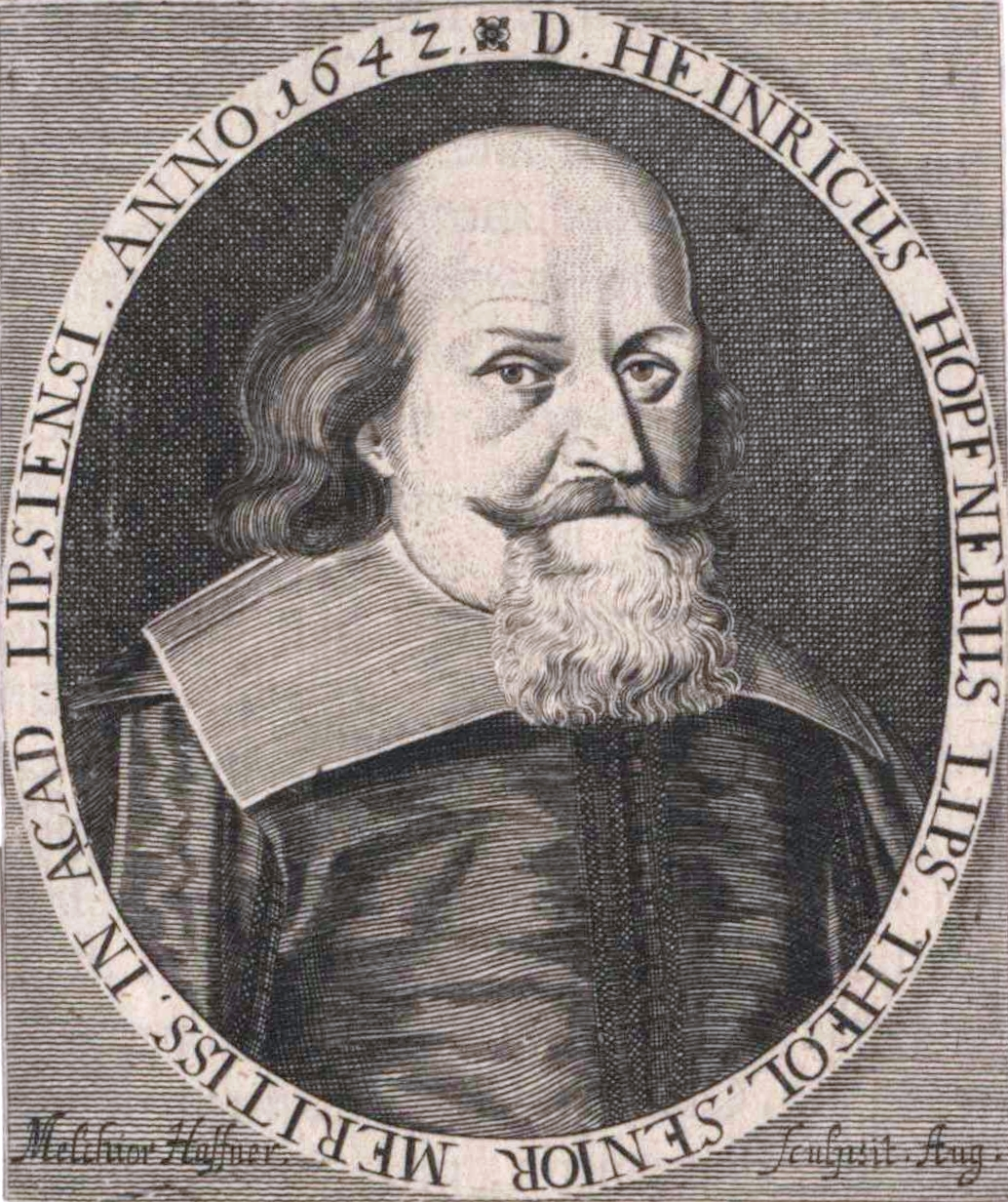 Heinrich Höpfner (1582–1642), deutscher evangelischer Theologe